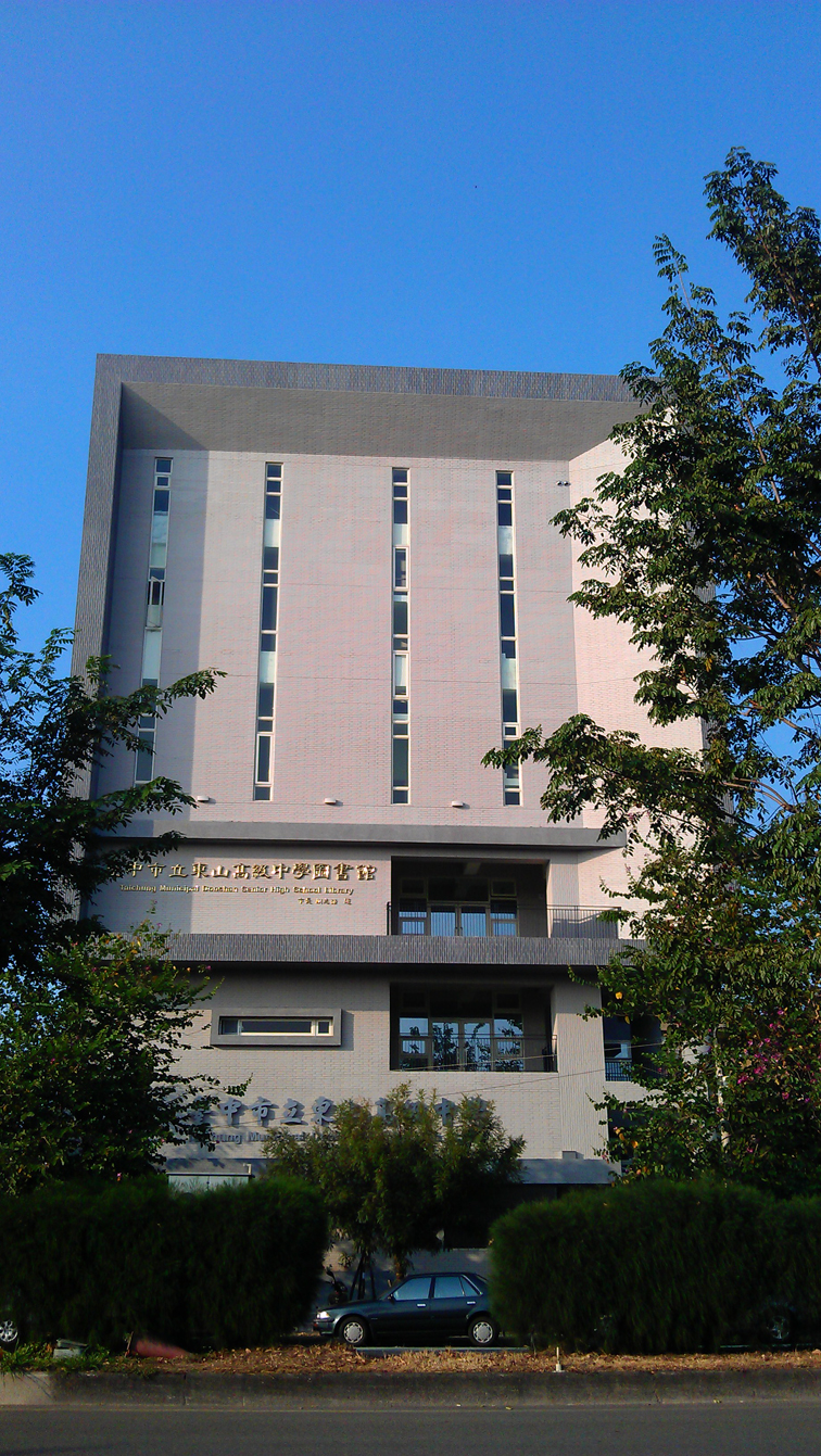 中文（台灣）: 臺中市立東山高級中學圖書館